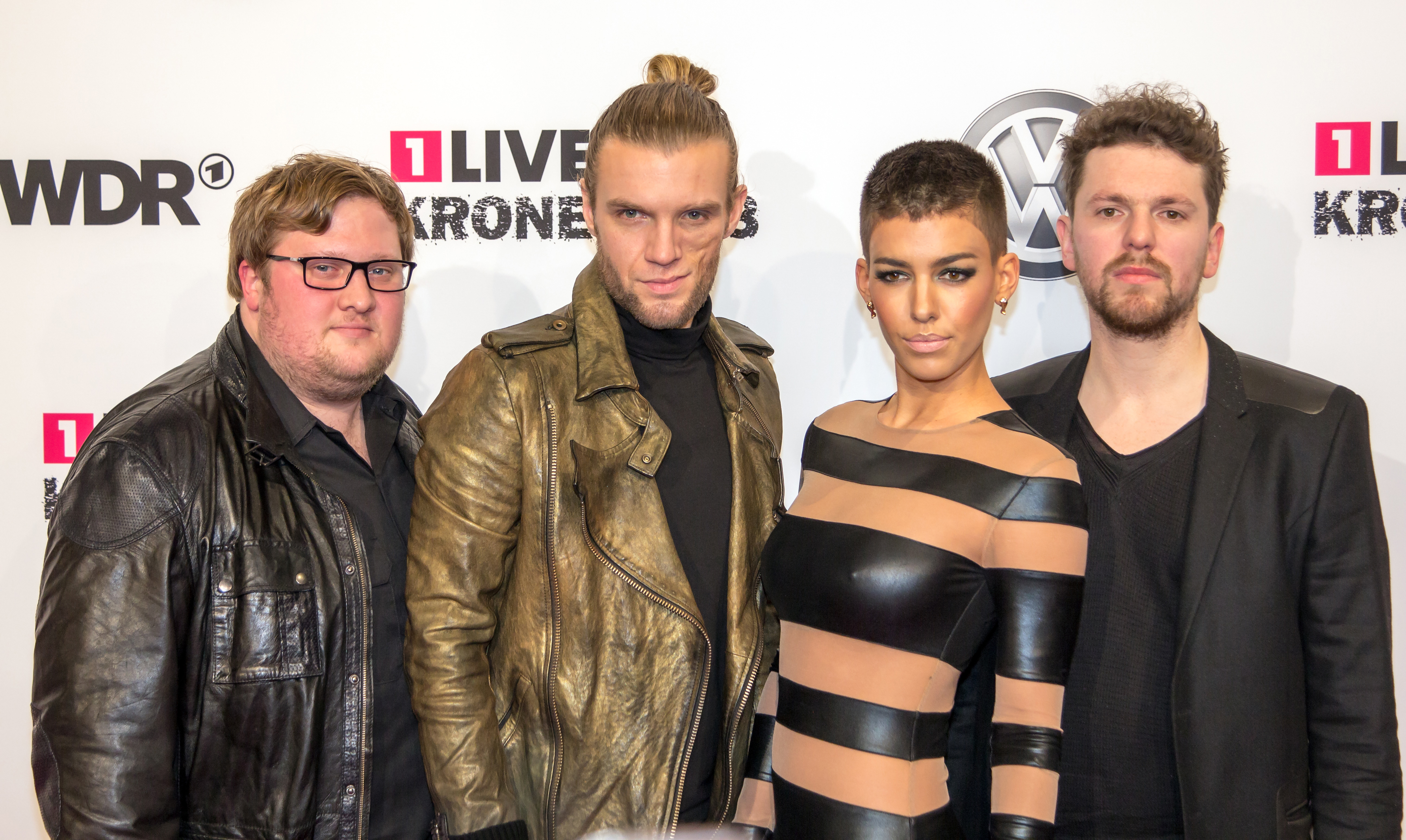 1 LIVE Krone 2013 Frida Gold